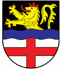 Wappen von Laudert